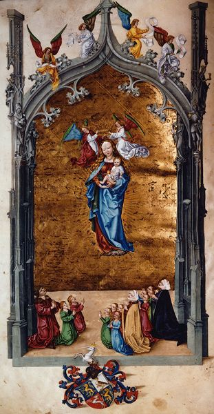 Smíškovský graduál - votivní listina s rodinou Smíšků